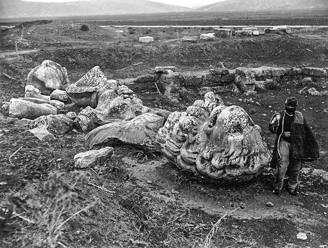 Brokstukke van 'n leeubeeld te Chaironeia, Griekeland, wat in 1818 ontdek is. Opgrawings om die beeld het tot die einde van die 19de eeu voortgeduur. Volgens 'n skrywer van die tweede eeu v.C., Pausanias, is die marmerleeu op 'n massagraf van Thebane opgerig wat in 'n veldslag in 338 v.C. teen die Makedoniese koning Filippus II gesneuwel het.